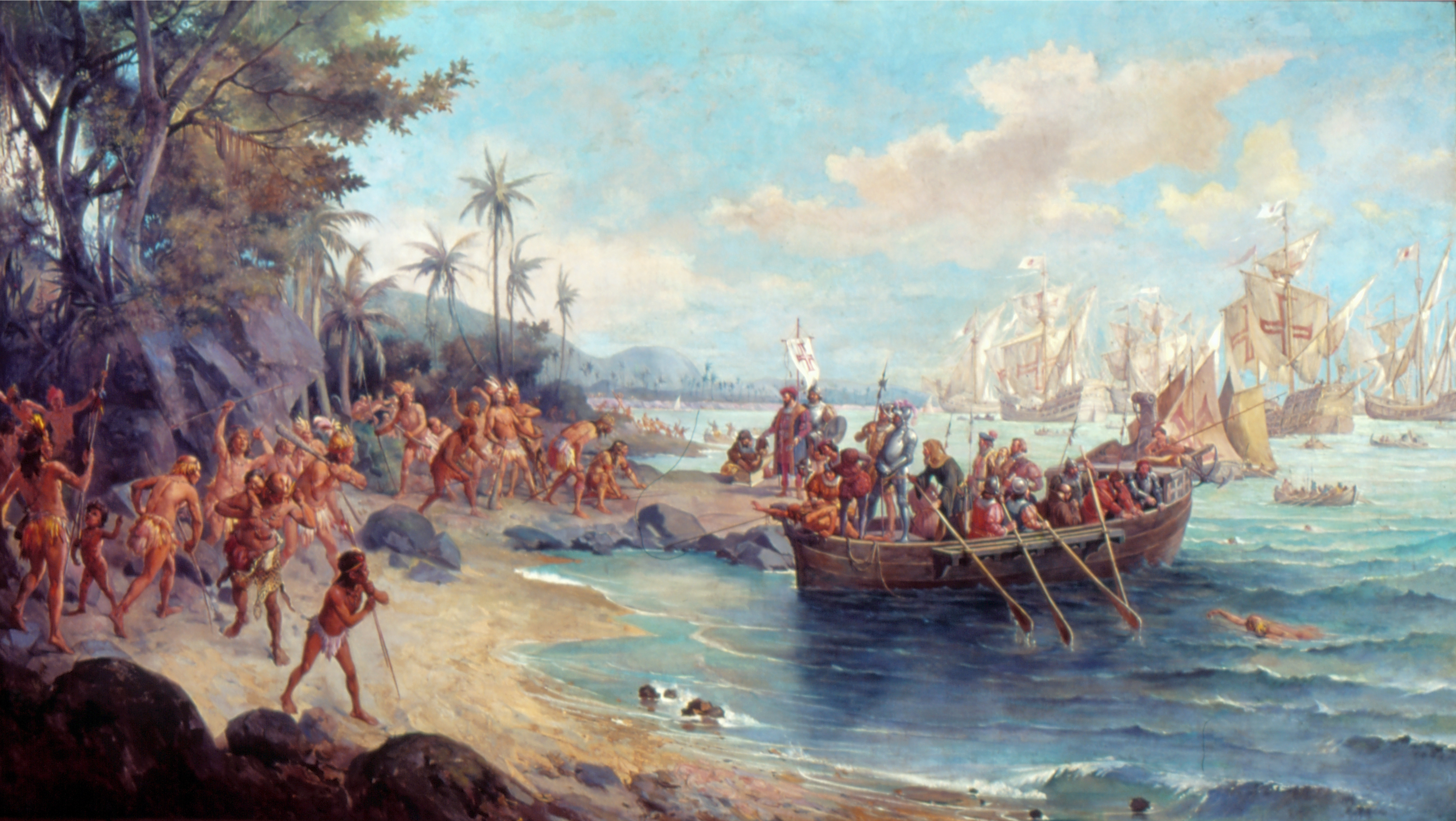 Obra que integra o acervo do Museu Paulista da USP. Coleção Fundo Museu Paulista - FMP